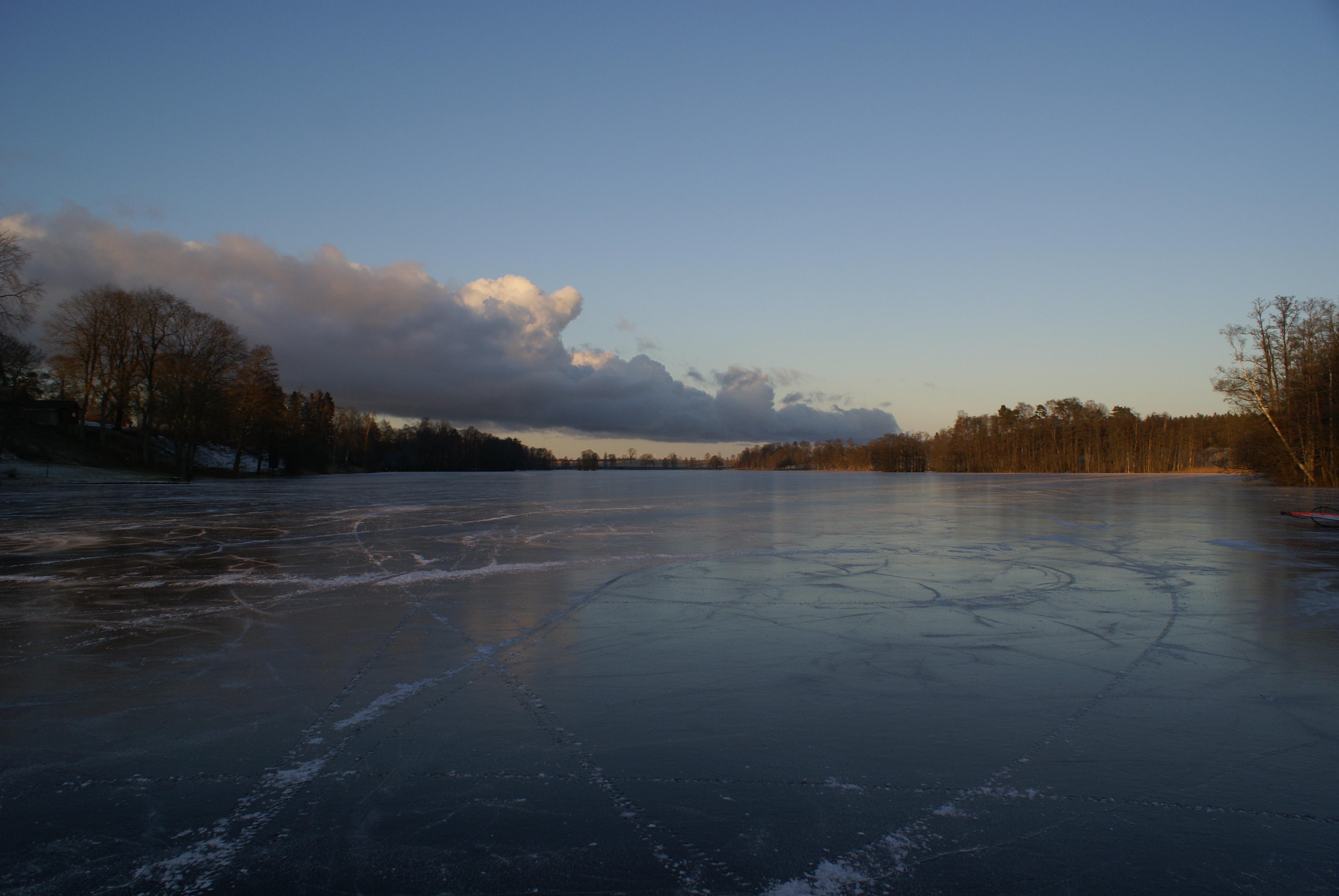 Barnarpssjön during winter.